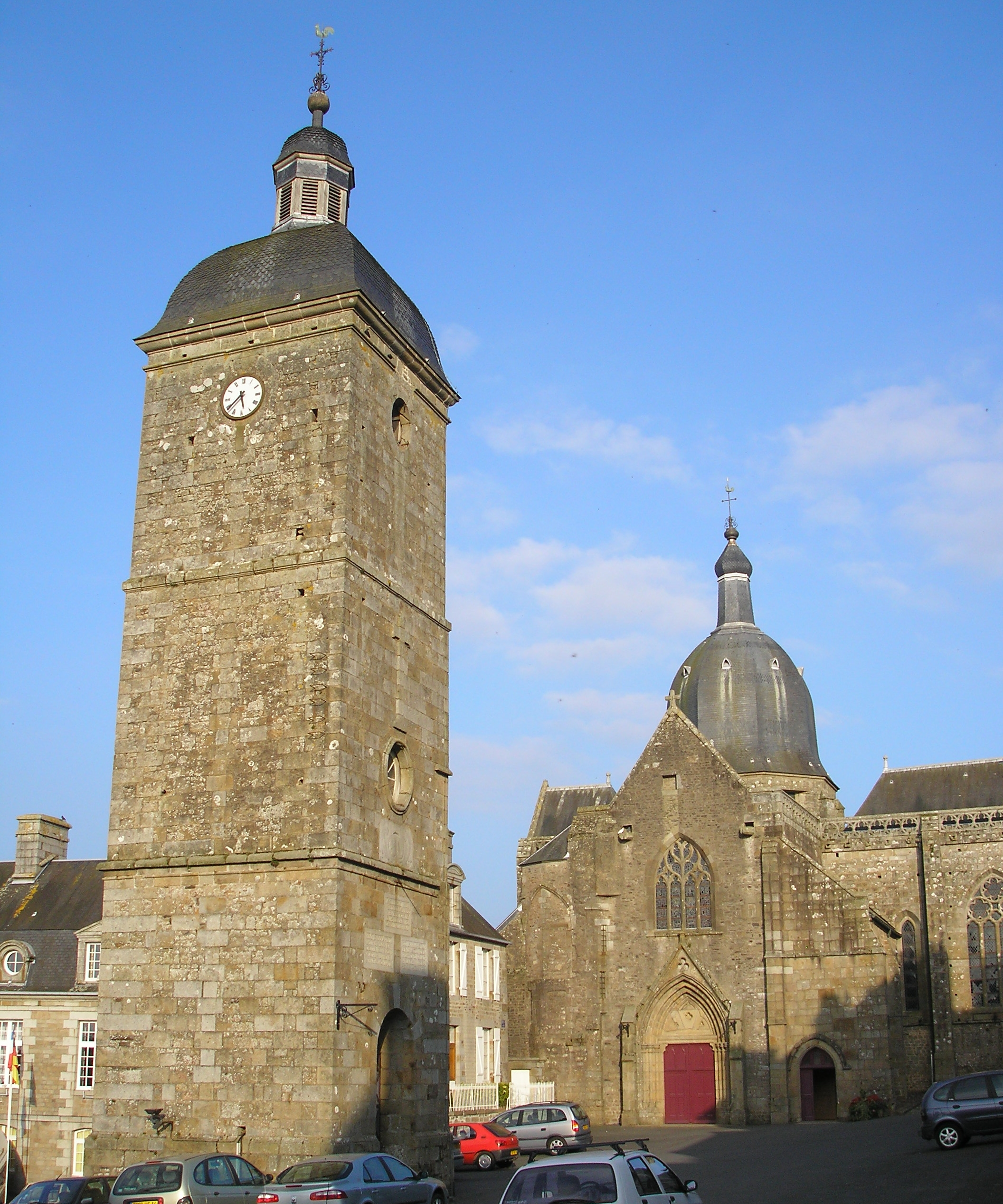 Saint-Sever-Calvados (Normandie, France). L'ancienne église abbatiale (actuelle église paroissiale) et le clocher de l'ancienne église paroissiale.